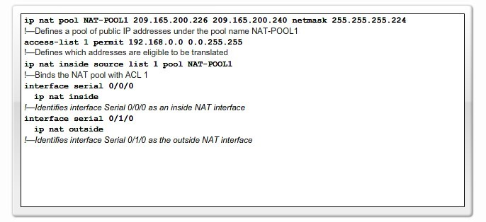 Монгол: Зураг4